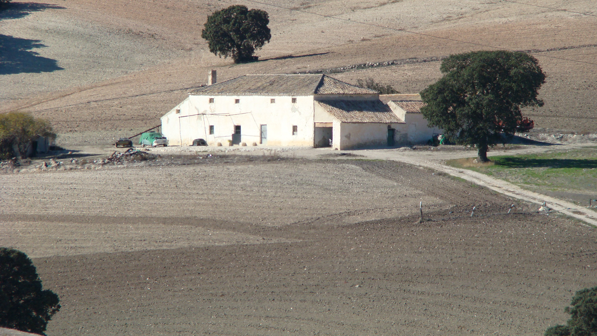 Cortijo aislado en Píñar (Granada - España)